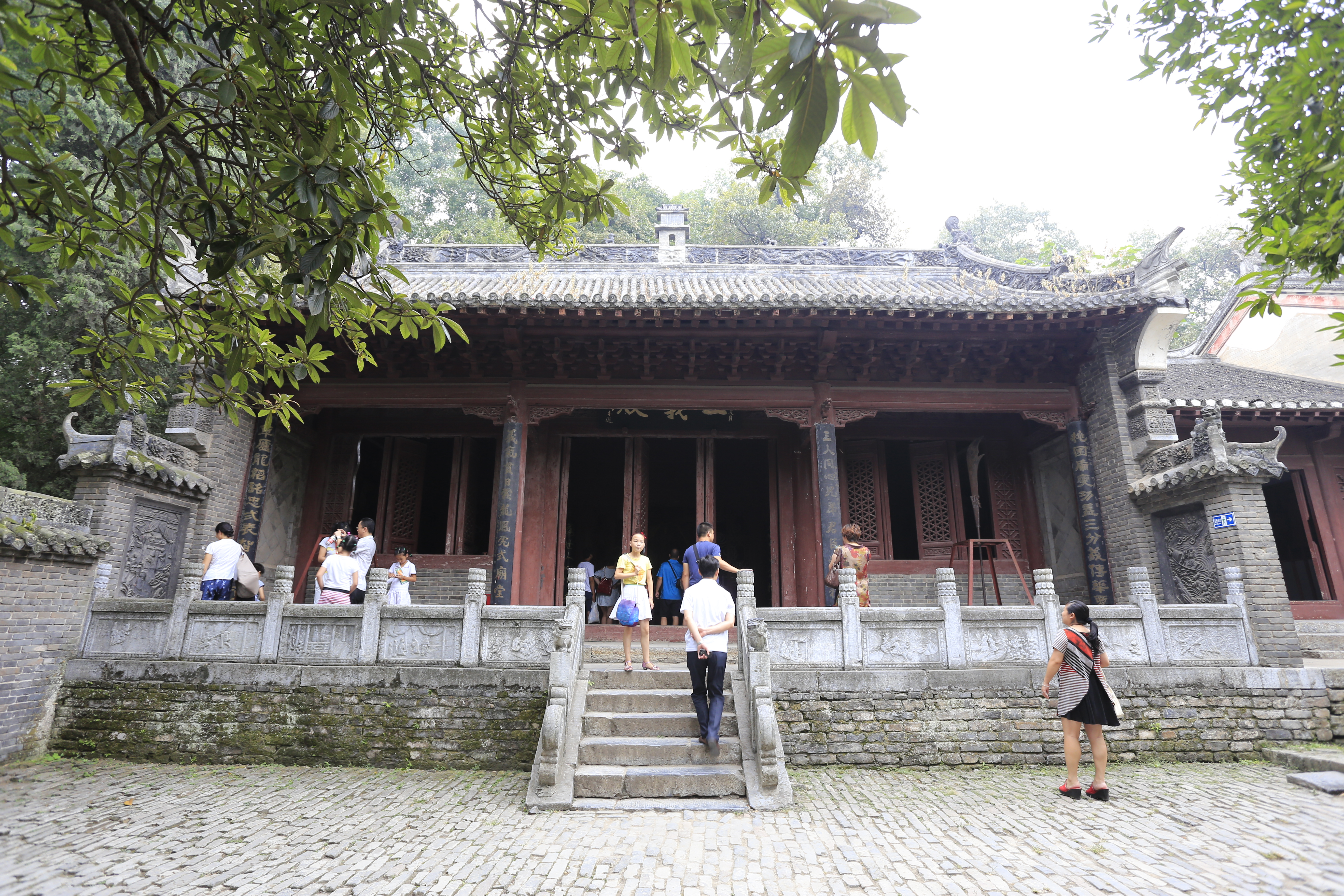 襄阳隆中 —— 三义殿